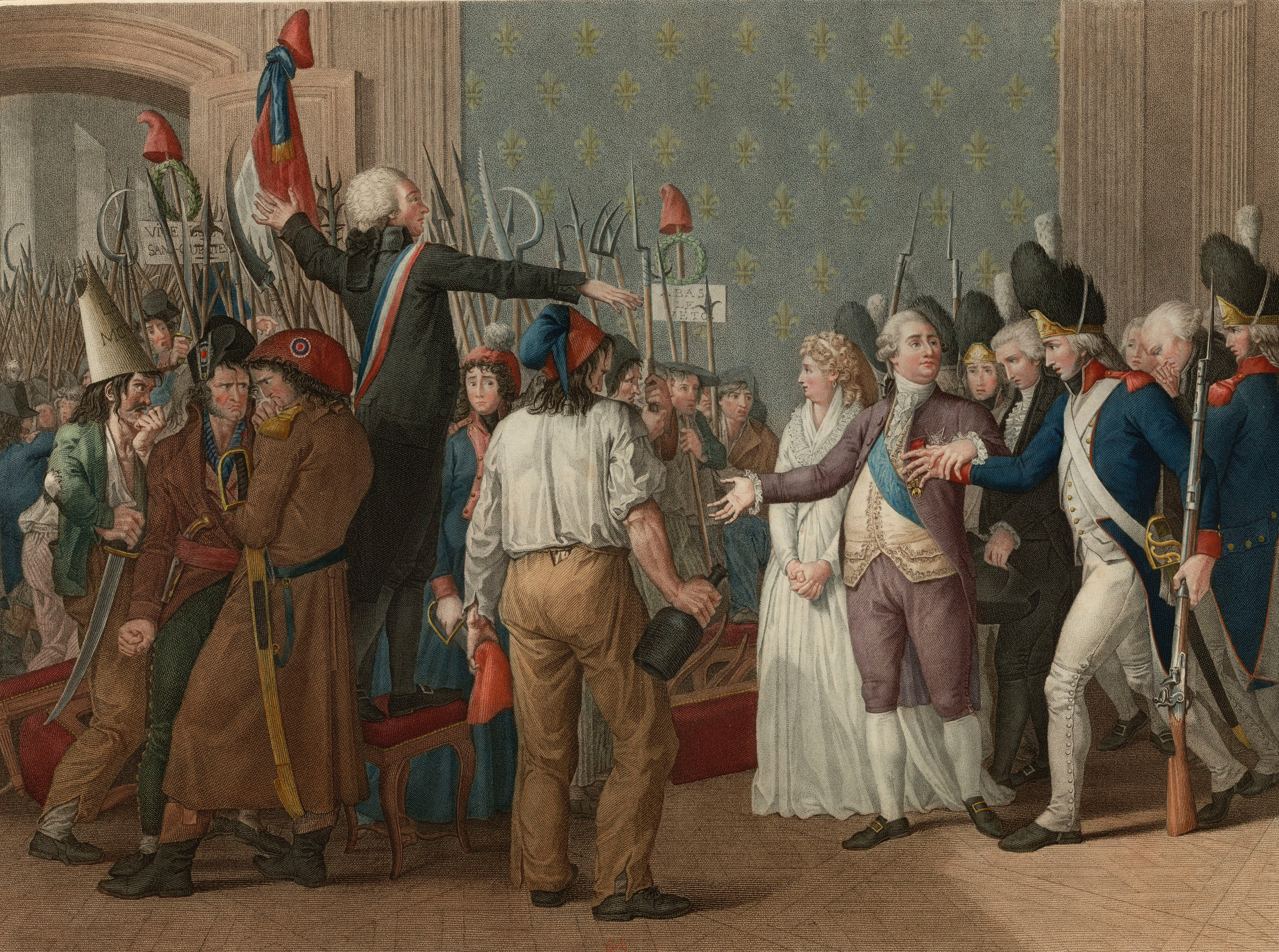 Journée du 20 juin 1792 au château des Tuileries. Estampe en couleur dessinée par Pierre Bouillon (1776-1831), gravée par Jean-Baptiste Vérité (1756-1837), auteur-éditeur, en 1796. Voir même sujet par les mêmes auteurs, en noir et blanc avec texte descriptif.